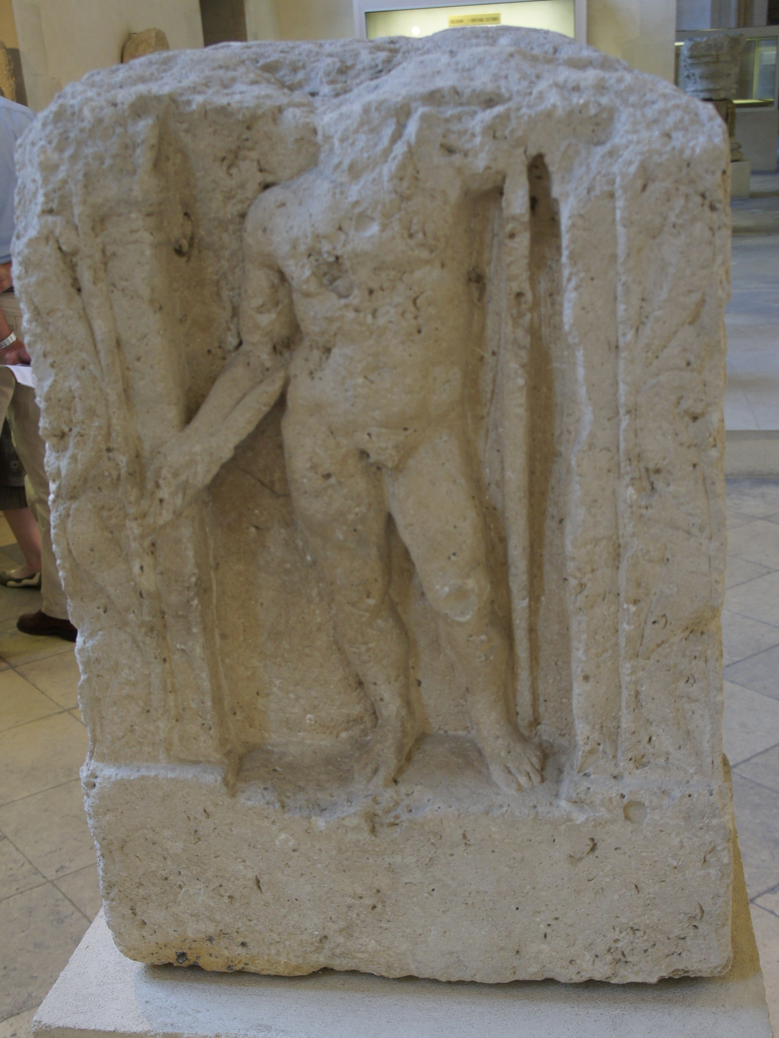 Dans la salle Roman antiquities du Musée Saint-Remi, bloc à quatres face, chacun une divinité, trouvé rue du temple avant 1897.